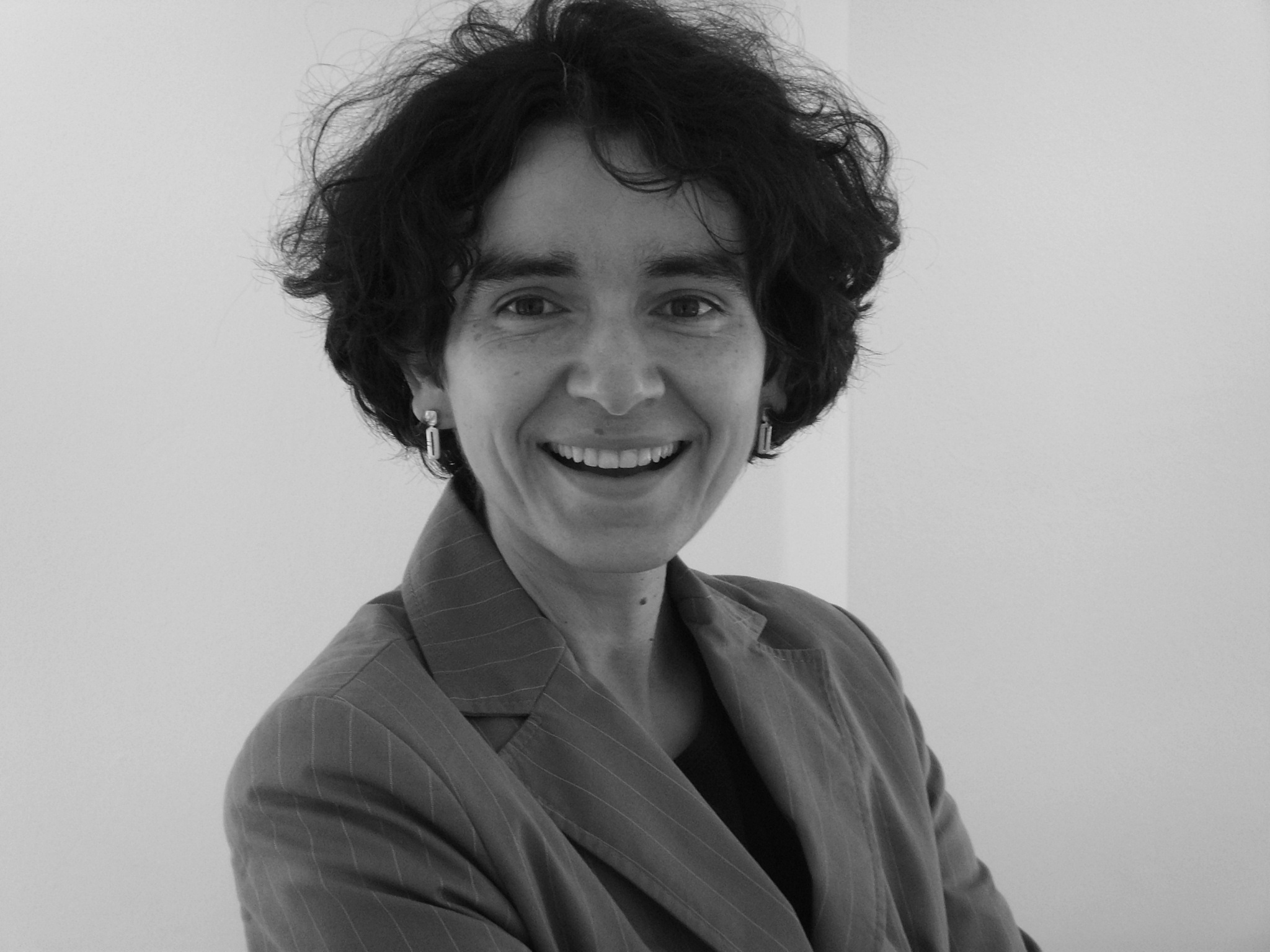 Laura Maria Bono